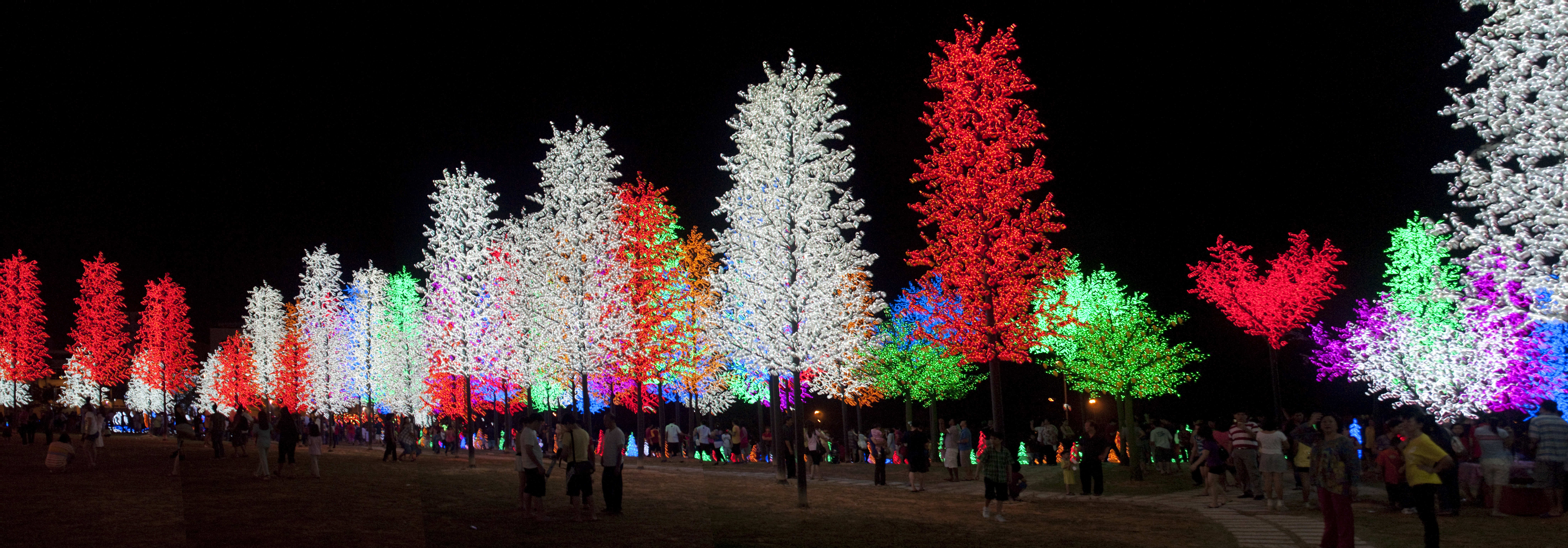 Pandangan panorama Forest of Lights di I-City, Shah Alam